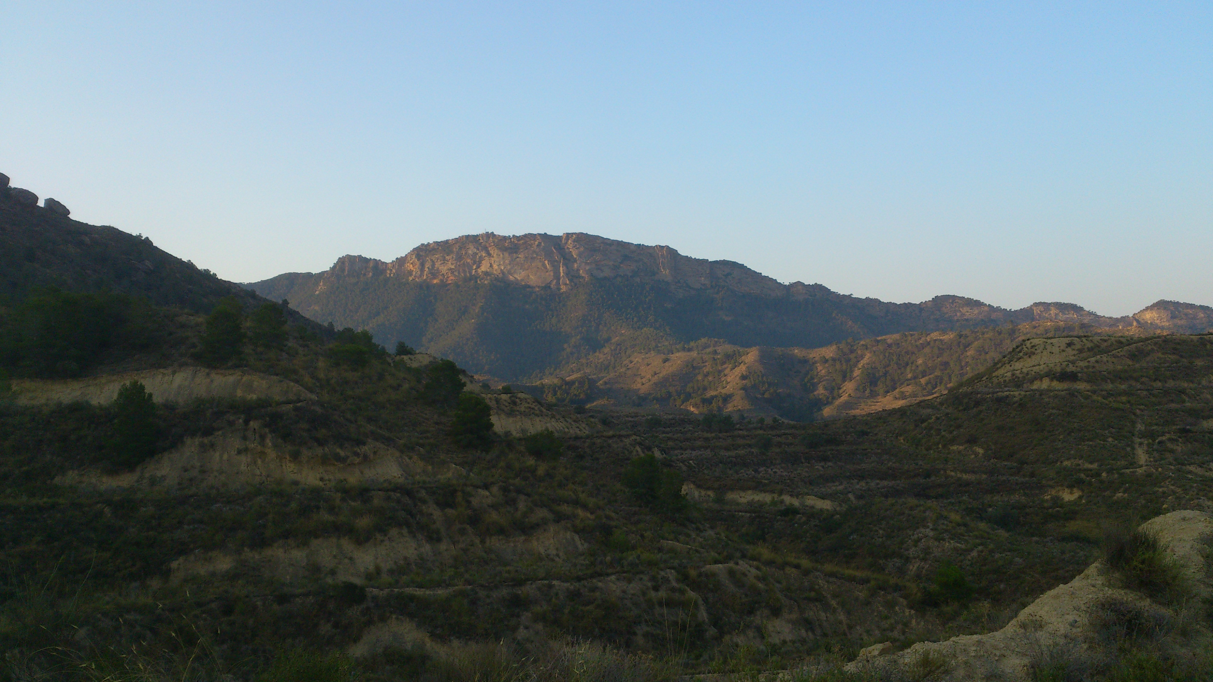 Columbares desde Los Mamellones, Murcia, España